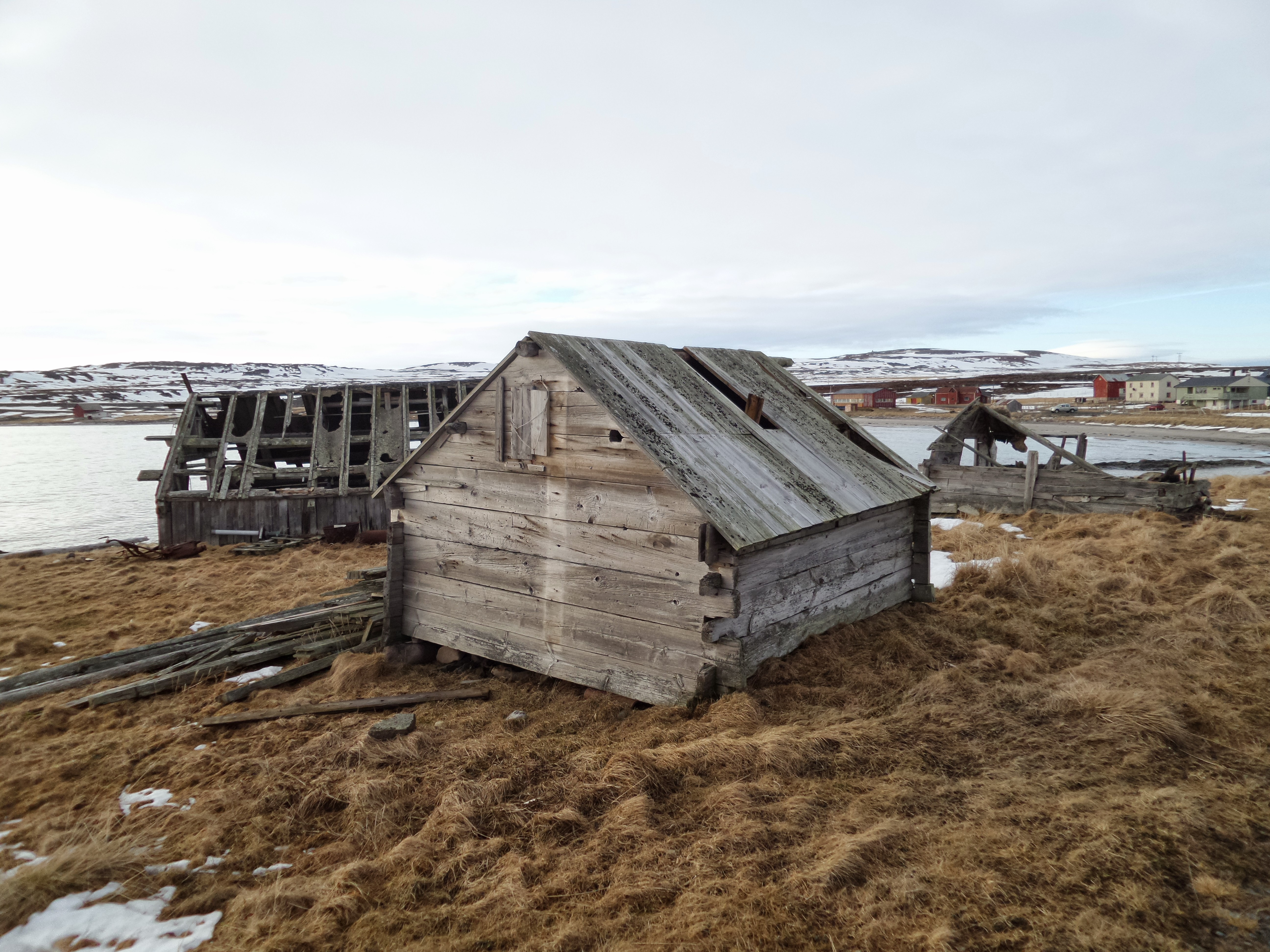 Shed used by Pomor fishermen in Kiberg